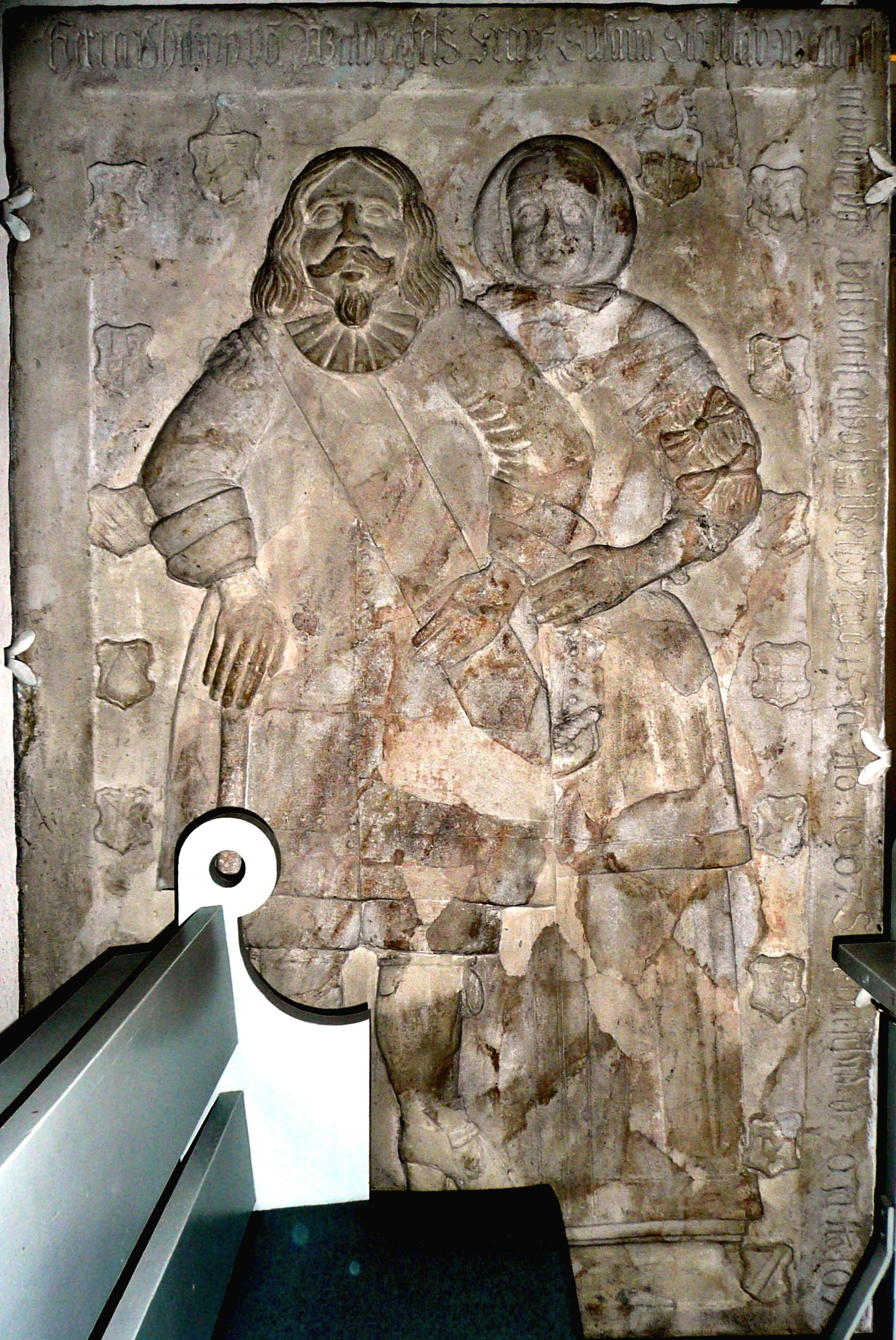 Grabstein des Philipp und der Susanna Sibilla von Waldenfels in der Kirche von Röslau (Bayern, Landkreis Wunsiedel)